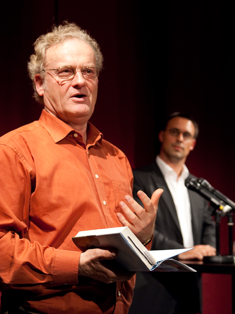 Friedrich Schorlemmer (mit Sören Bartol, MdB im Hintergrund) bei einer Lesung in Marburg